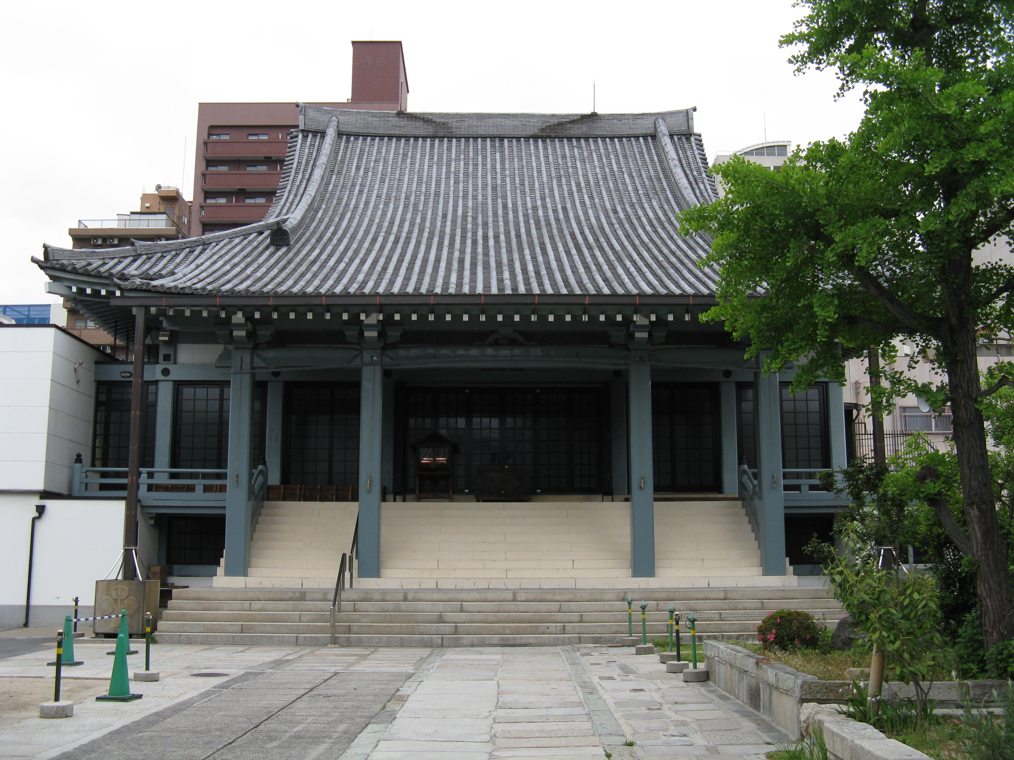 和光寺 本堂